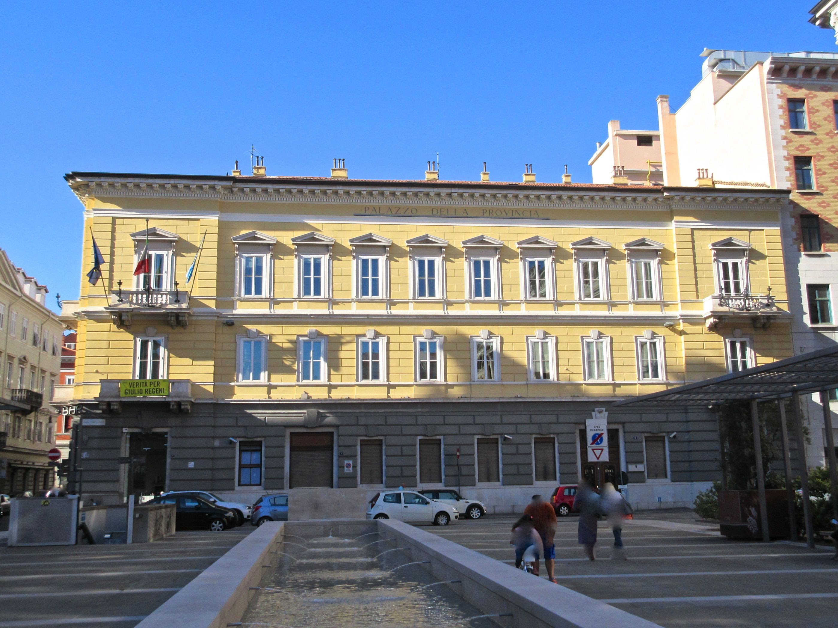 Trieste - Palazzo Galatti in Piazza Vittorio Veneto 4